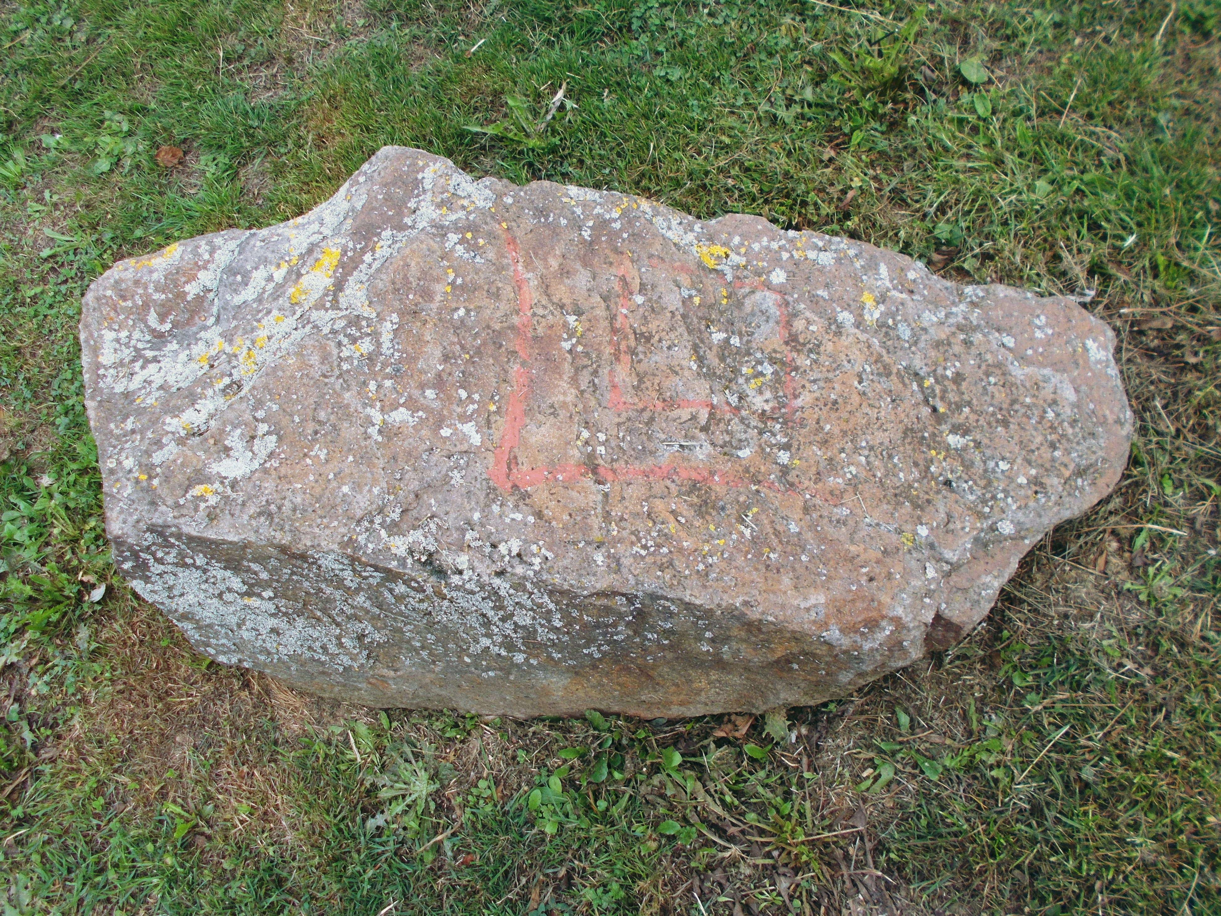 Zu Ehren Emil von Behring gestaltete 2013 die Mülheimer Künstlergruppe "AnDer" e. V. den Von-Behring-Platz. Skulptur "Eben Schethija" von Christine Lehmann.